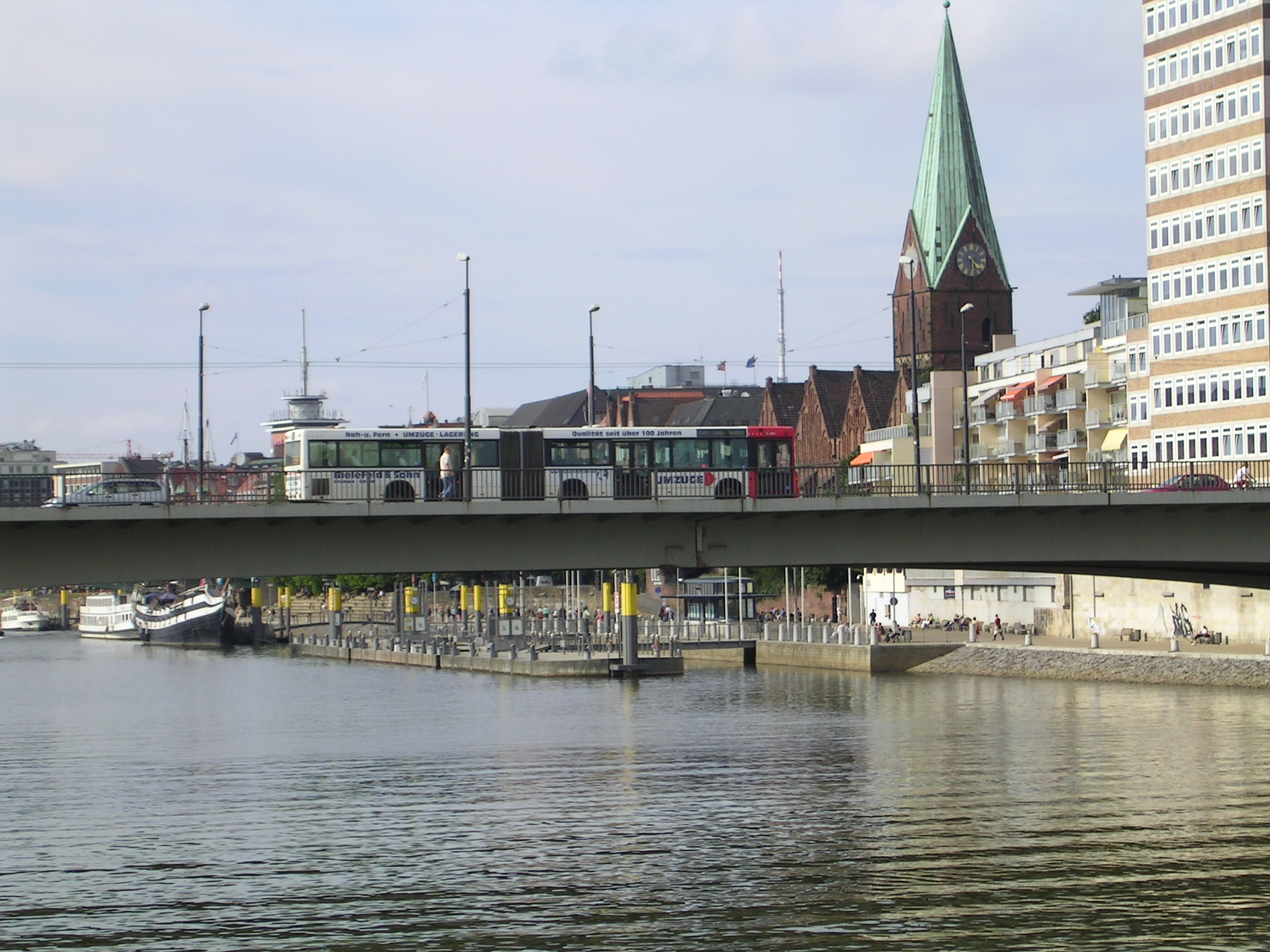 User:Tarawneh/rami